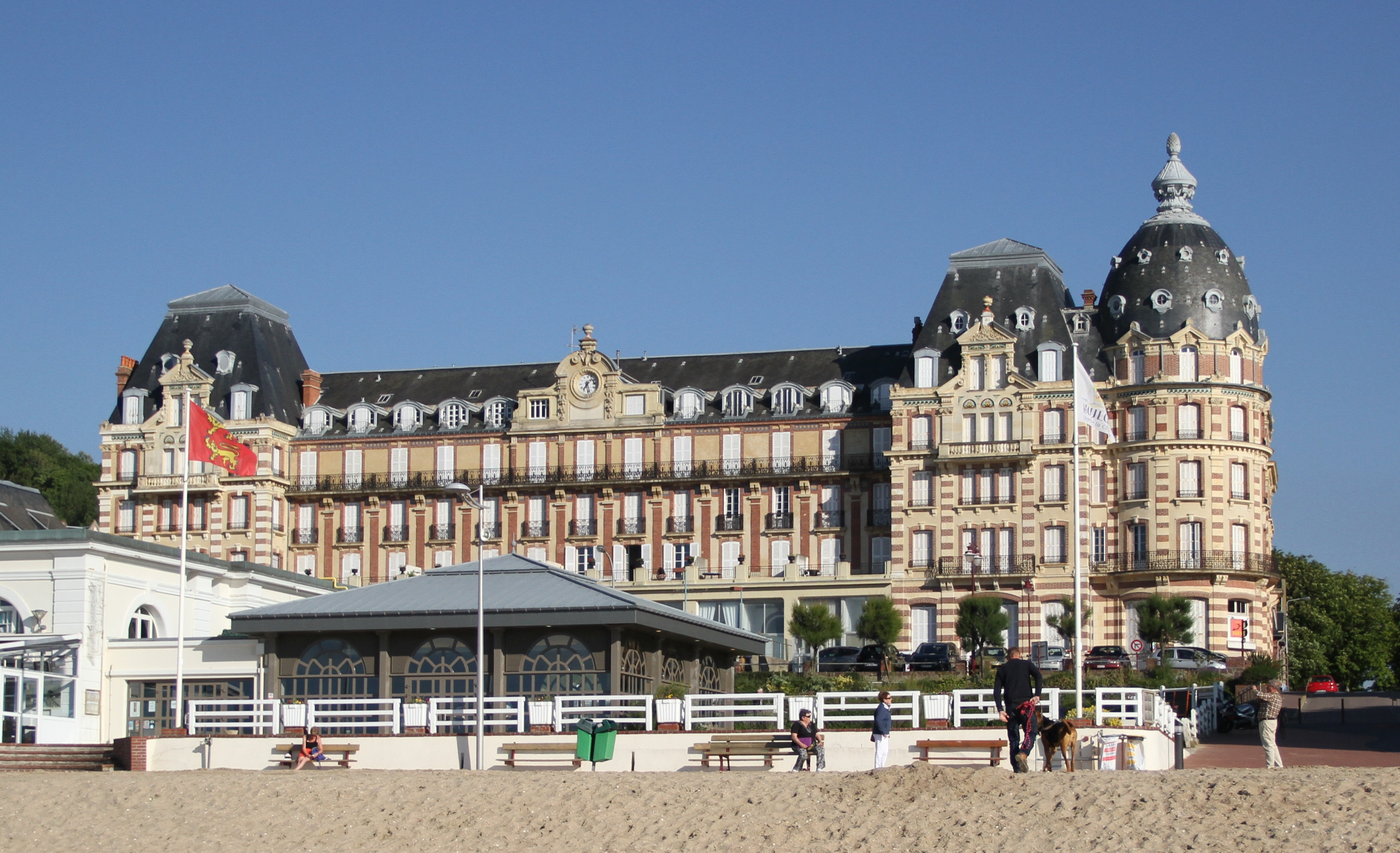 Grand Hôtel .